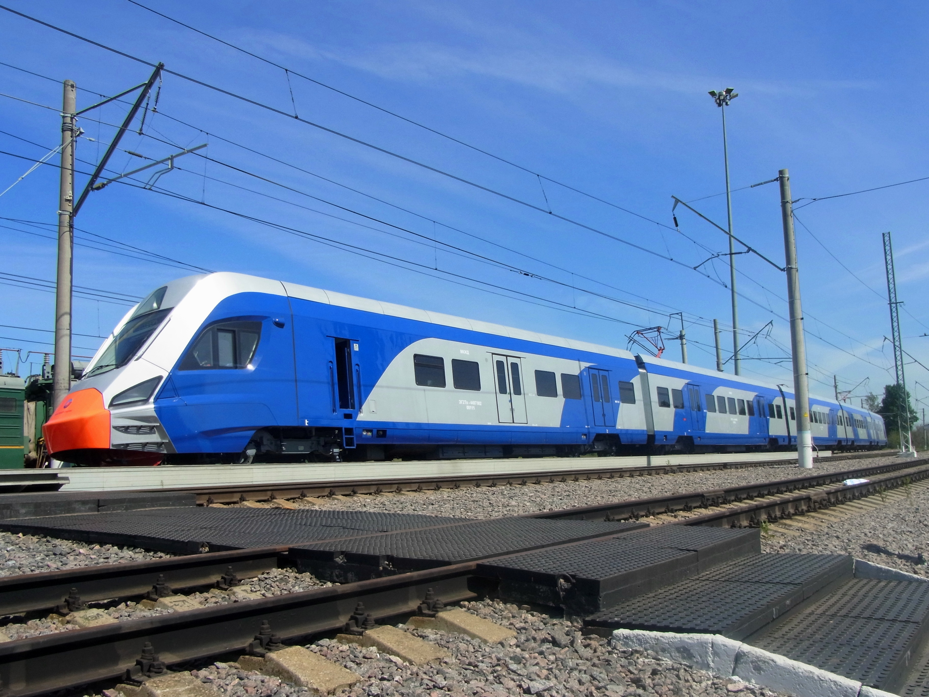 Электропоезд ЭГ2Тв-001 на платформе кольца ВНИИЖТ в Щербинке